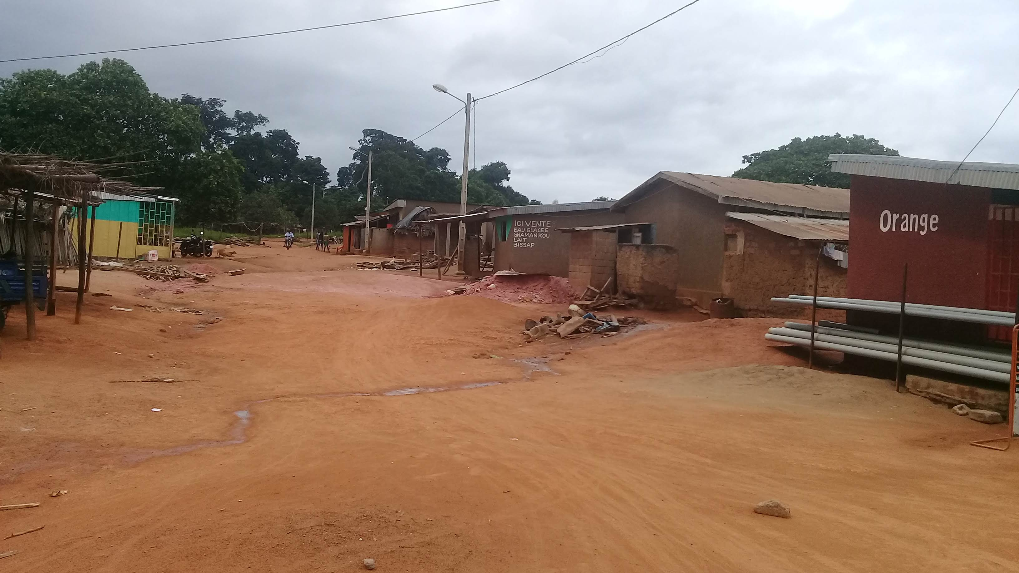 Torossanguéhi est une localité du nord-est de la Côte d'Ivoire